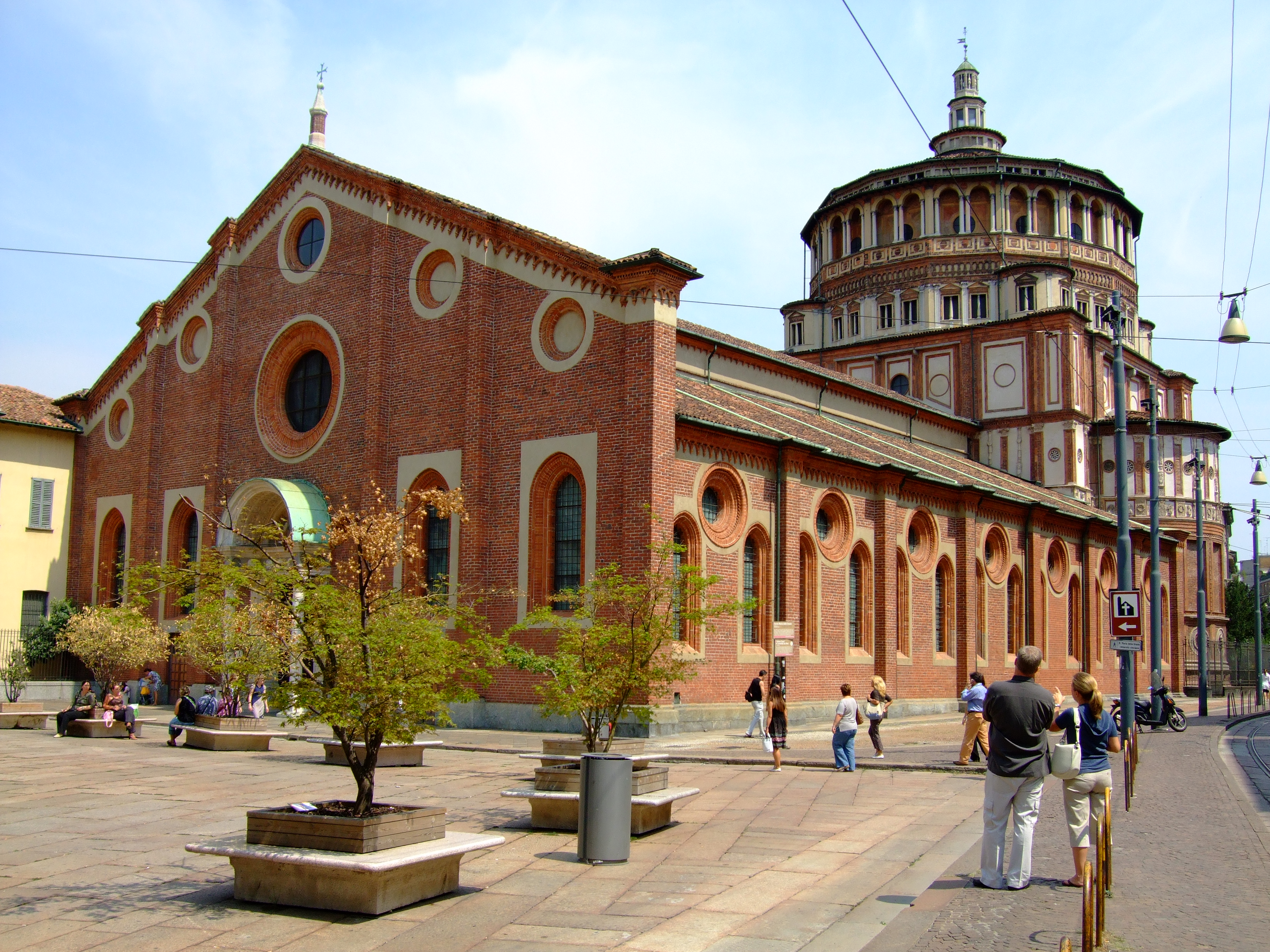 Santa Maria delle Grazie in Milan, Italy.